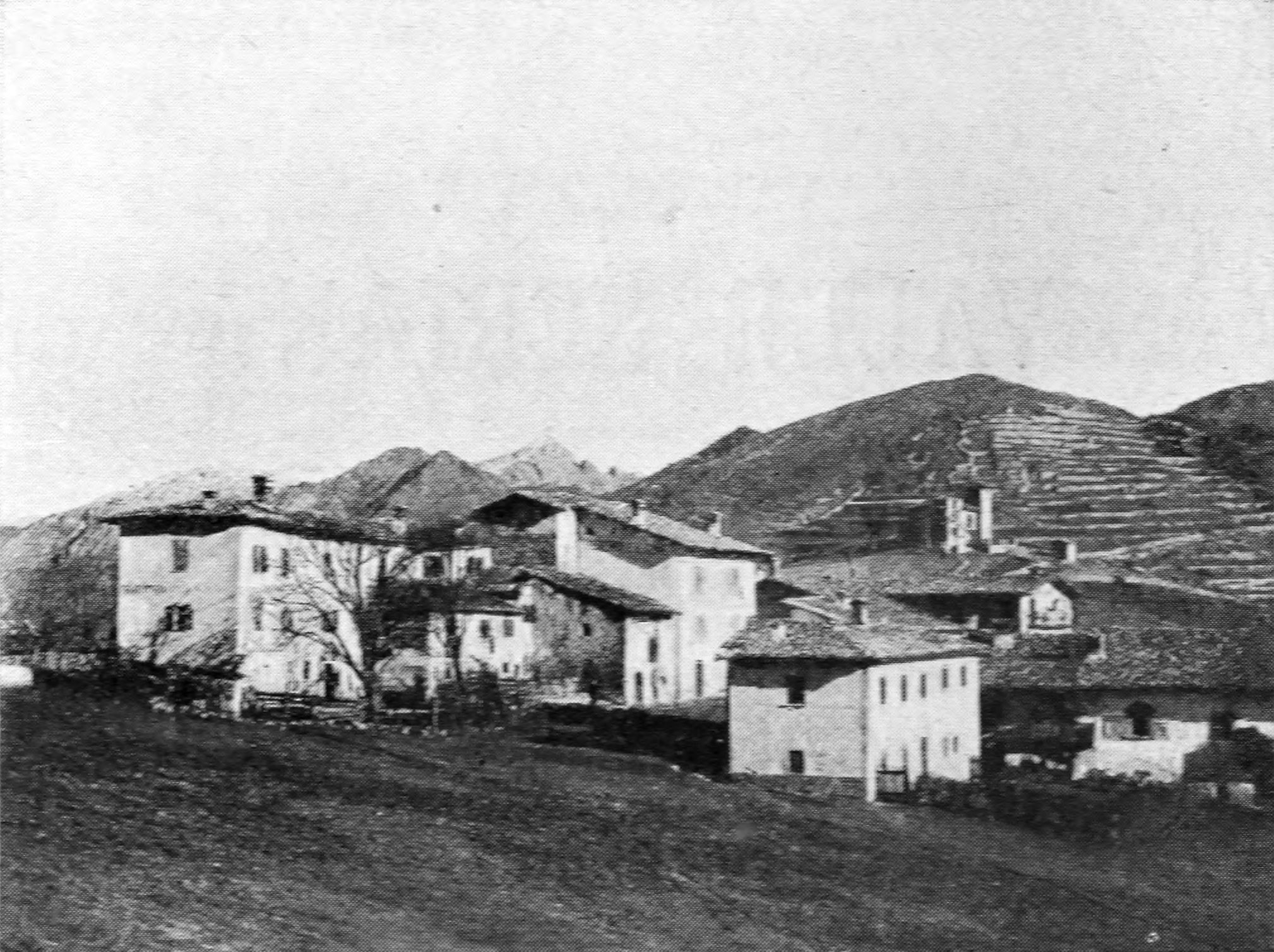 Immagine dal libro Bergamo e sue valli, Brescia e sue valli, Lago d'Iseo, Valcamonica, Società Anonima Guide Lampugnani, Milano, 1900 - Selvino